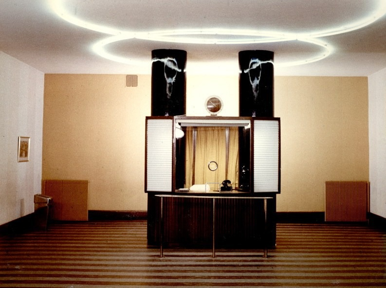 Jarlen kino etter ominnredning i 1960. Foyeren med billettluke